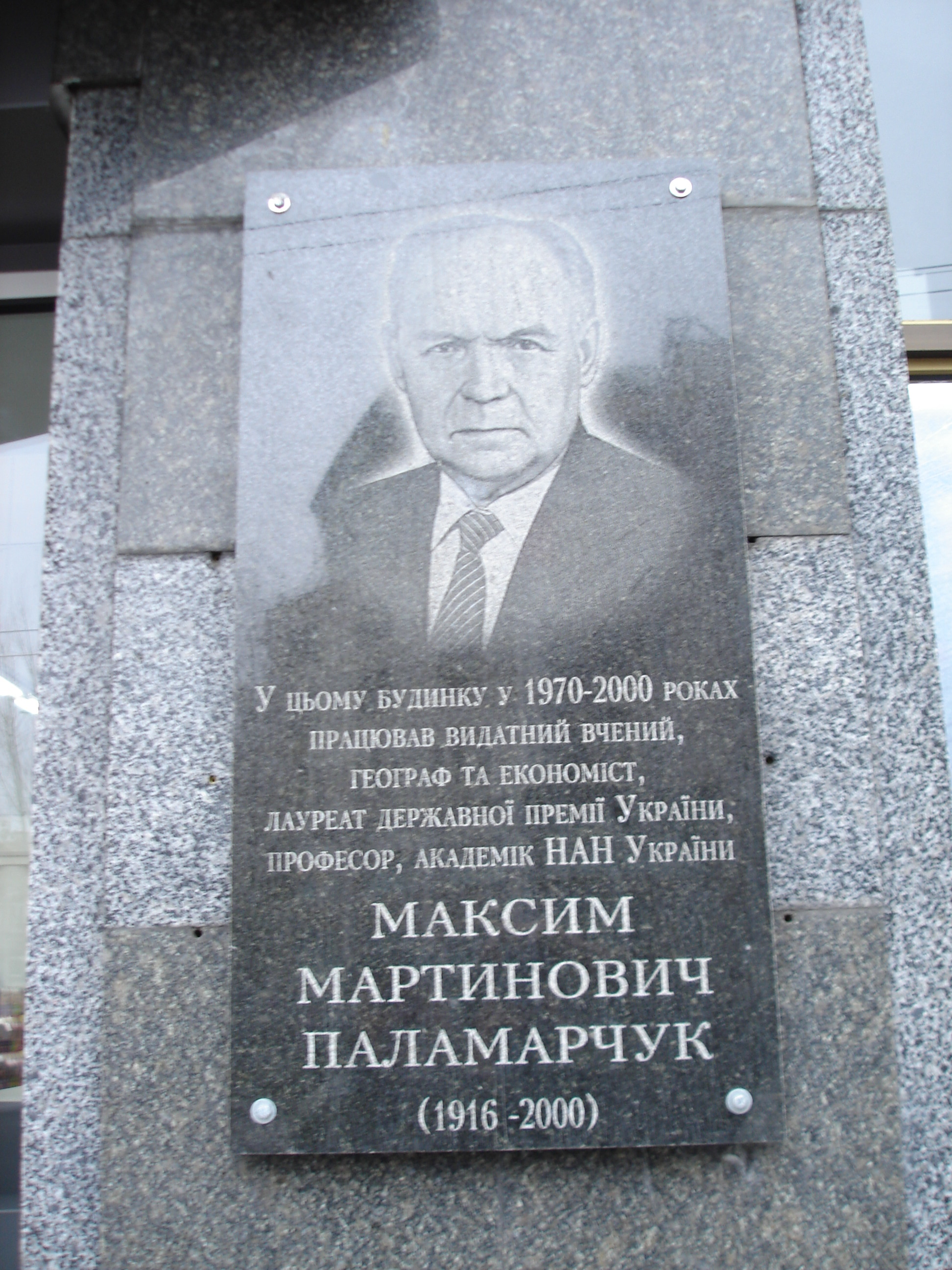 Меморіальна дошка академіку НАН України Максимові Паламарчуку